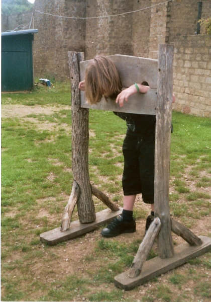 tjitte